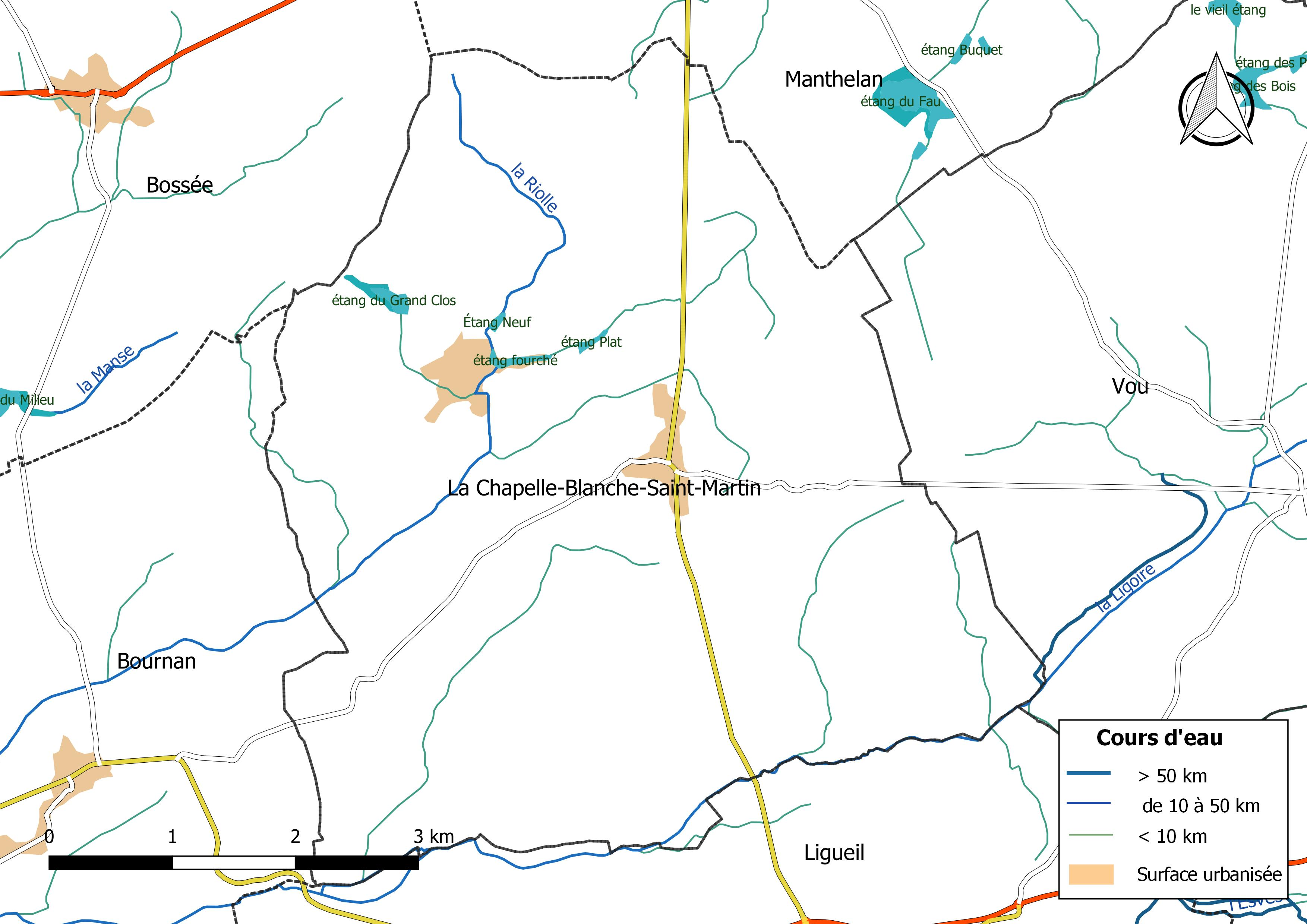 Carte du réseau hydrographique de la commune de La Chapelle-Blanche-Saint-Martin (France).